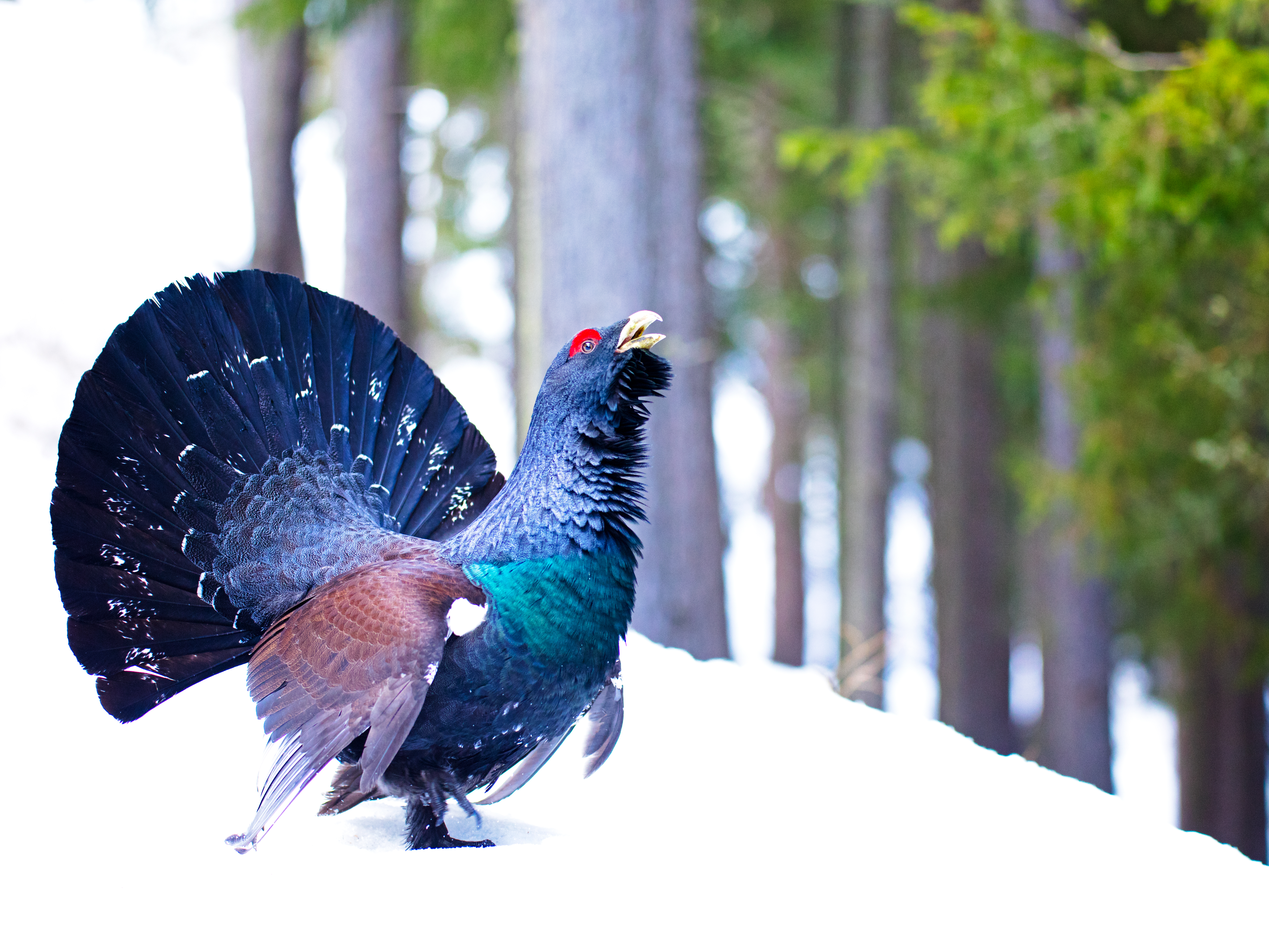 Parco nazionale dello Stelvio (Q1891711)